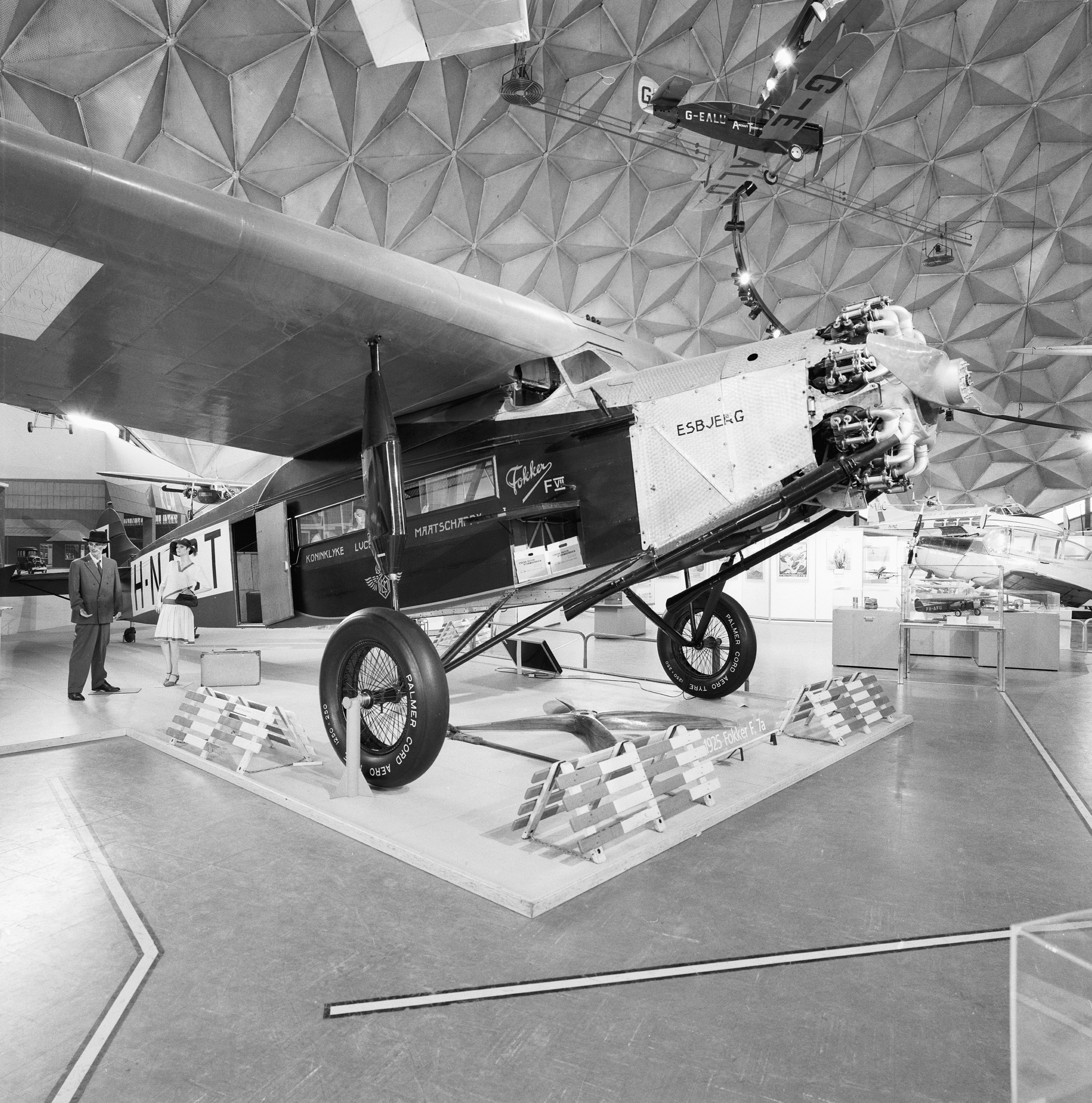 AVIODOME: INT. OVERZICHT VLIEGTUIGEN